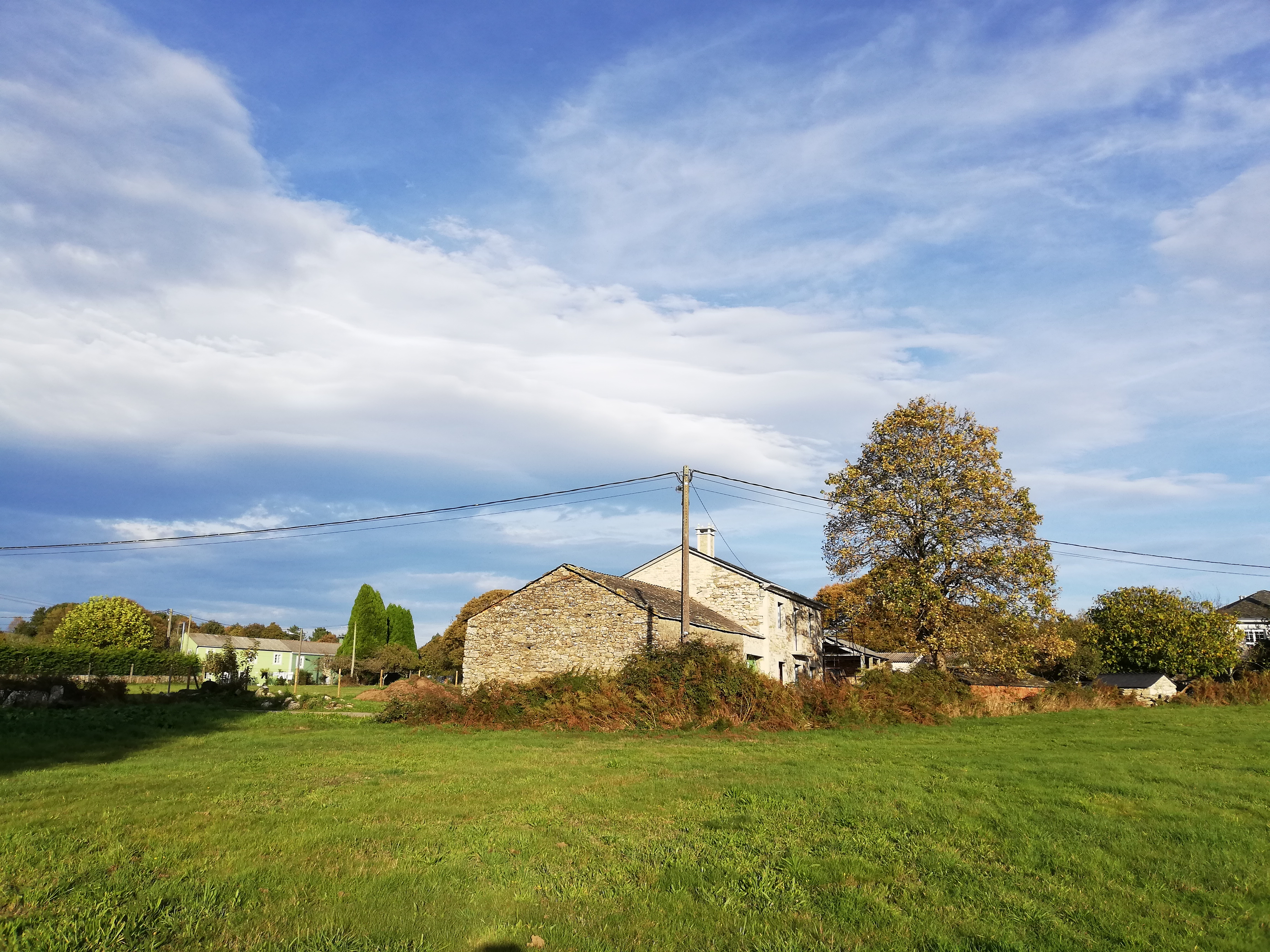 Vista do lugar de Vilate, na parroquia de San Martiño de Lanzós, Vilalba.